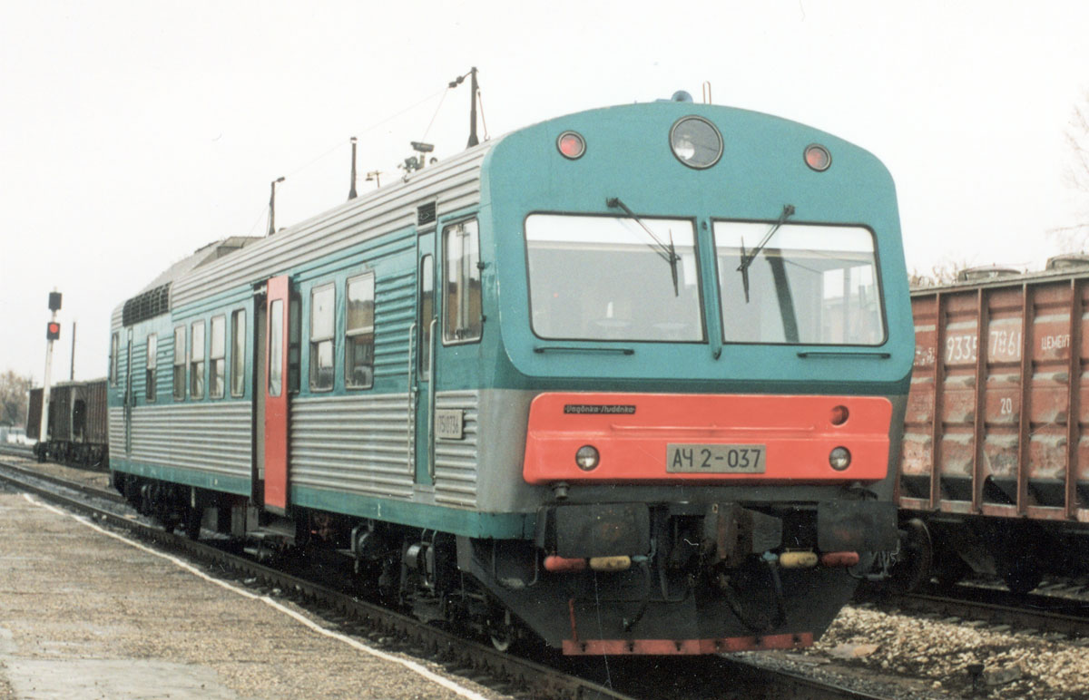 Автомотриса АЧ2-037 на станции Арчеда